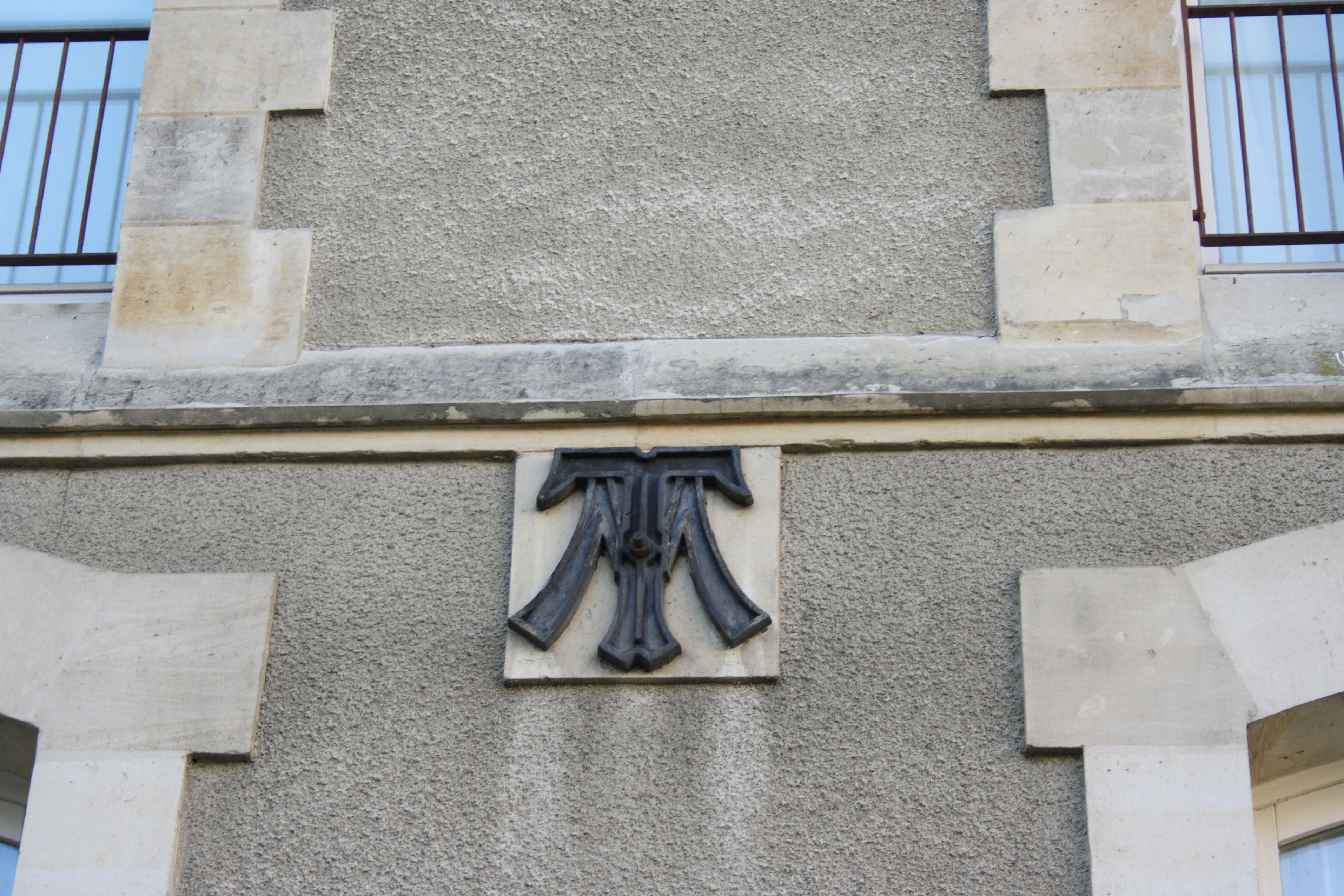 Ehemalige Tabakmanufaktur in Issy-les-Moulineaux im Département Hauts-de-Seine (Région Île-de-France), Rue Ernest Renan N° 17; Monogramm MT